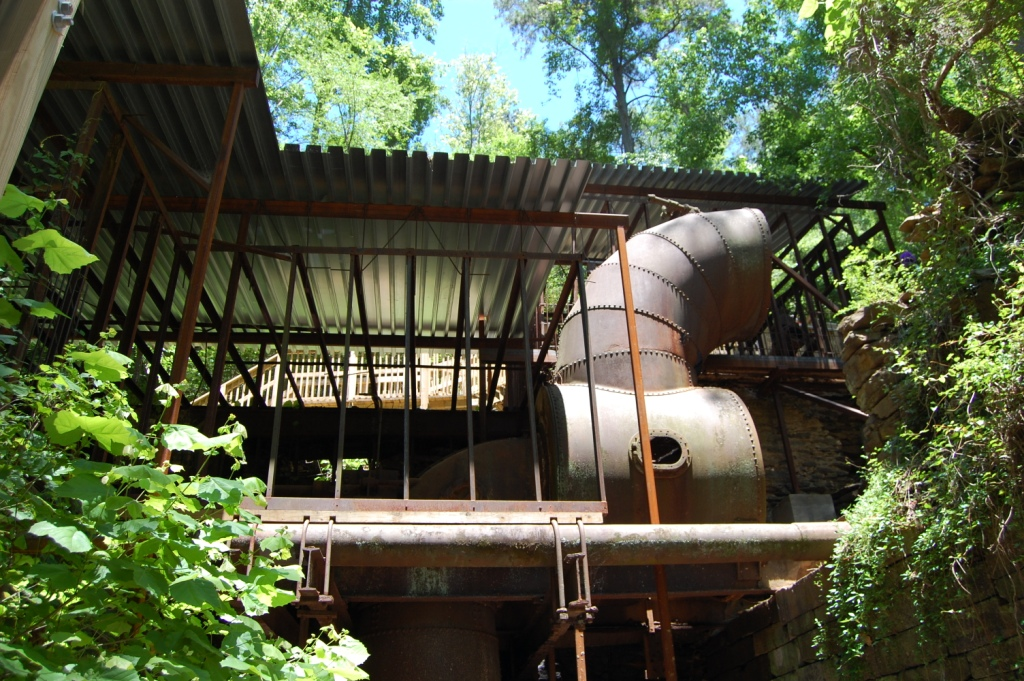 Roswell Mill ruins